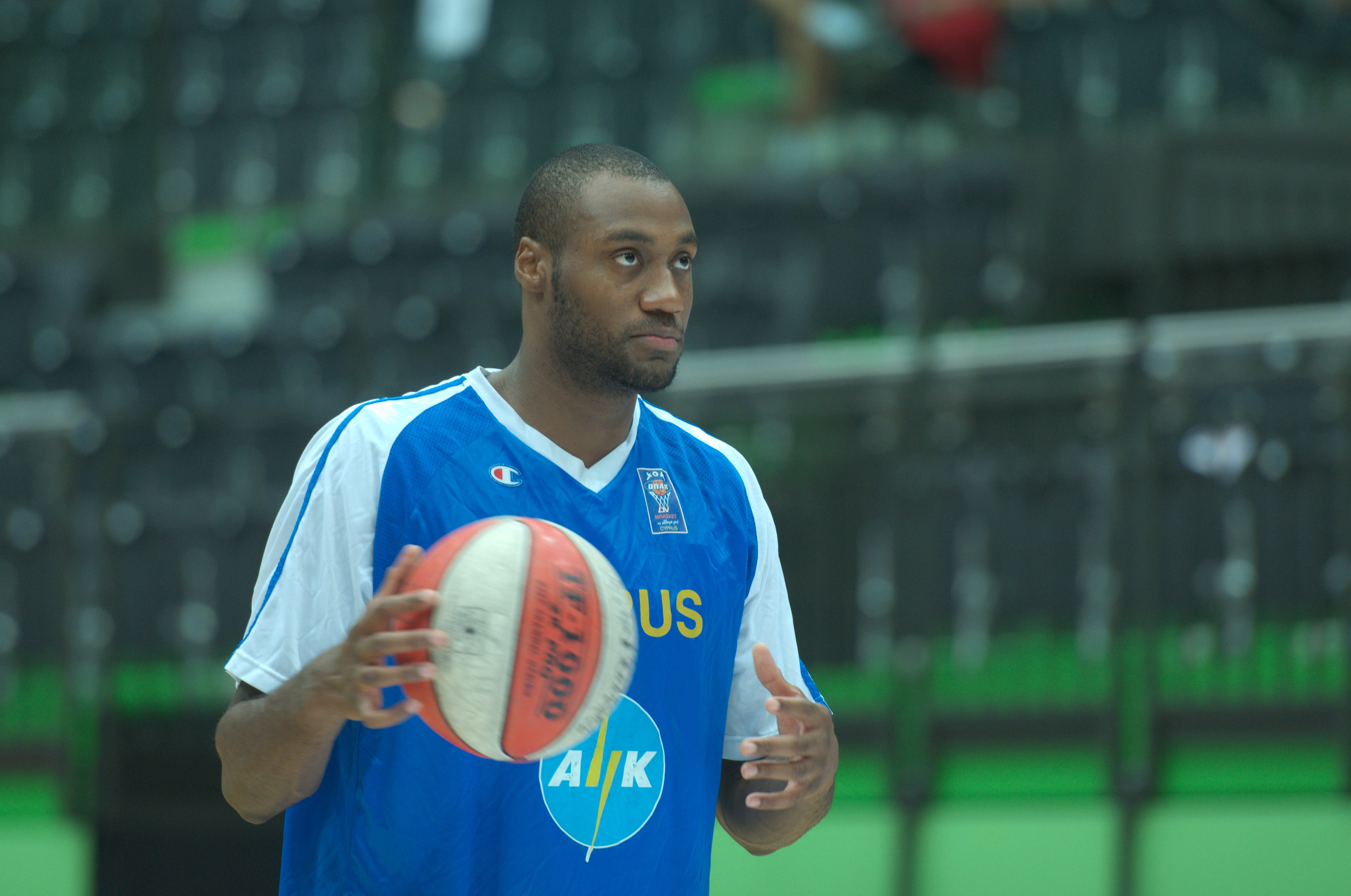 Anthony King beim Aufwärmen zum Eurobasket-Qualispiel in Österreich, 2012